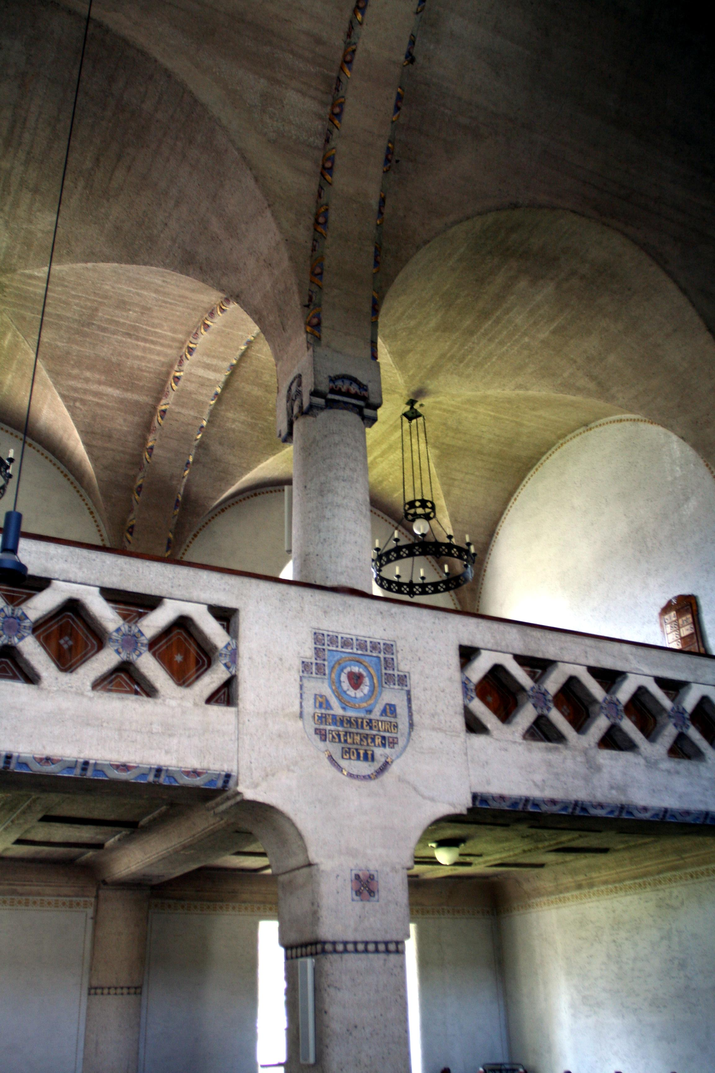 Bad Steben, Lutherkirche